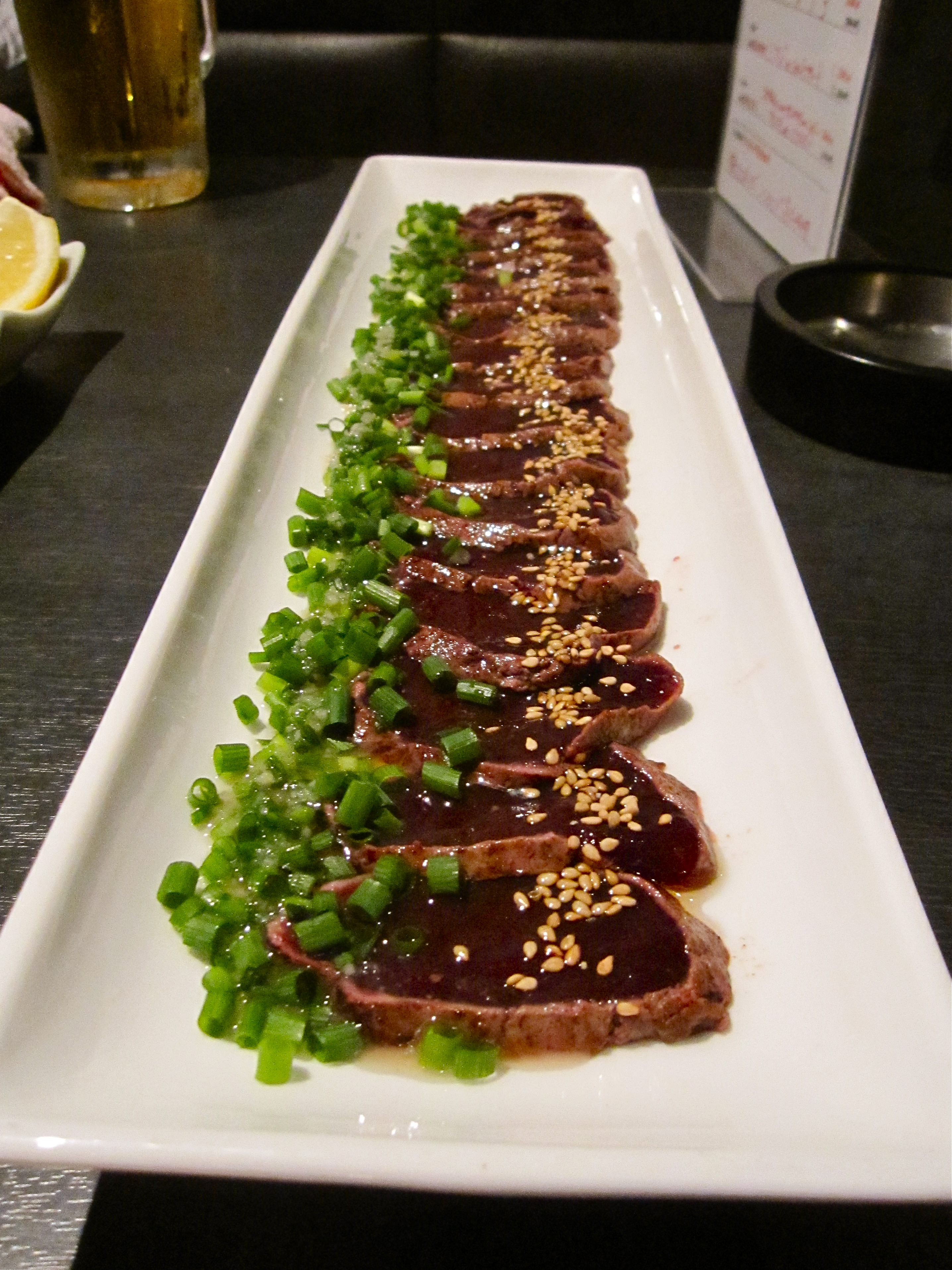 レバ刺しは居酒屋のおつまみとして愛され、惜しまれながら引退した